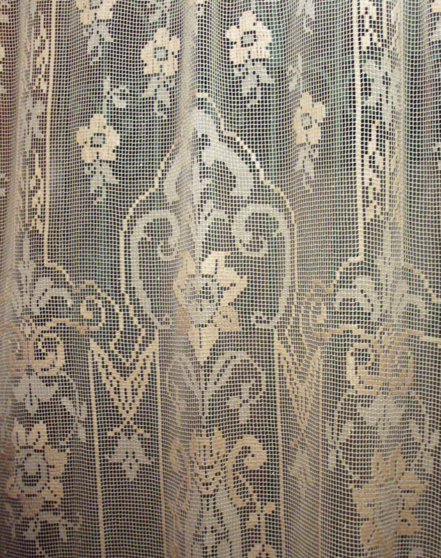 Detalhe de antiga cortina em renda "filé", confeccionada por artesão anônimo na região de Caxias do Sul